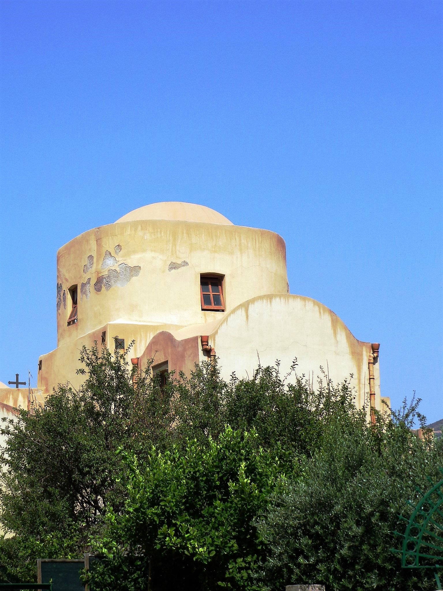 Chiesa della Madonna Addolorata. Foto presente su pagine web personali e sul profilo FB.